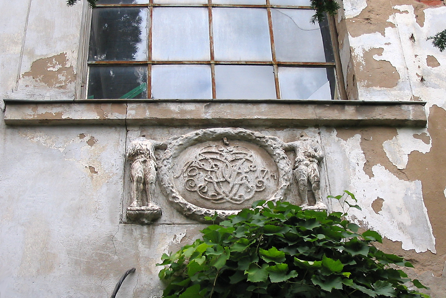 Donadini-Haus, Relief zwischen Portal und Atelierfenster am Tag des offenen Denkmals